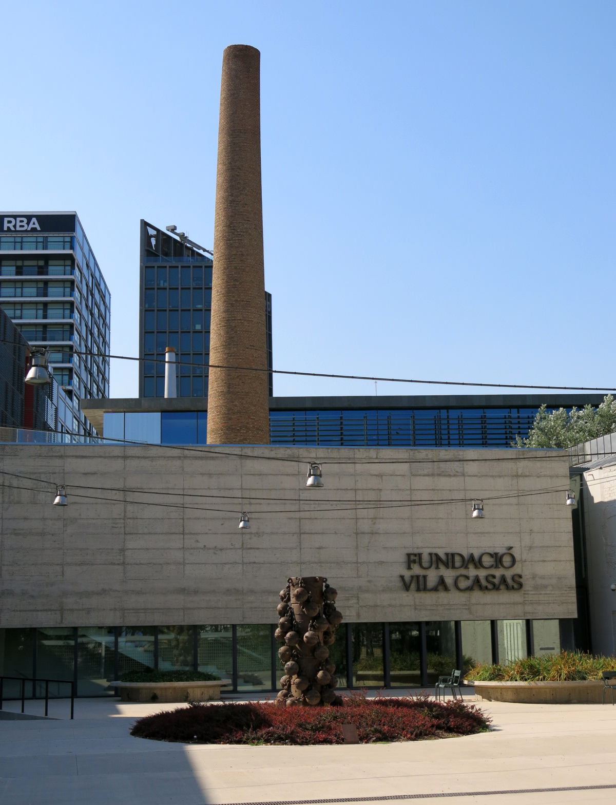 Can Framis (Barcelona) Object location41° 24′ 13.58″ N, 2° 11′ 40.5″ E